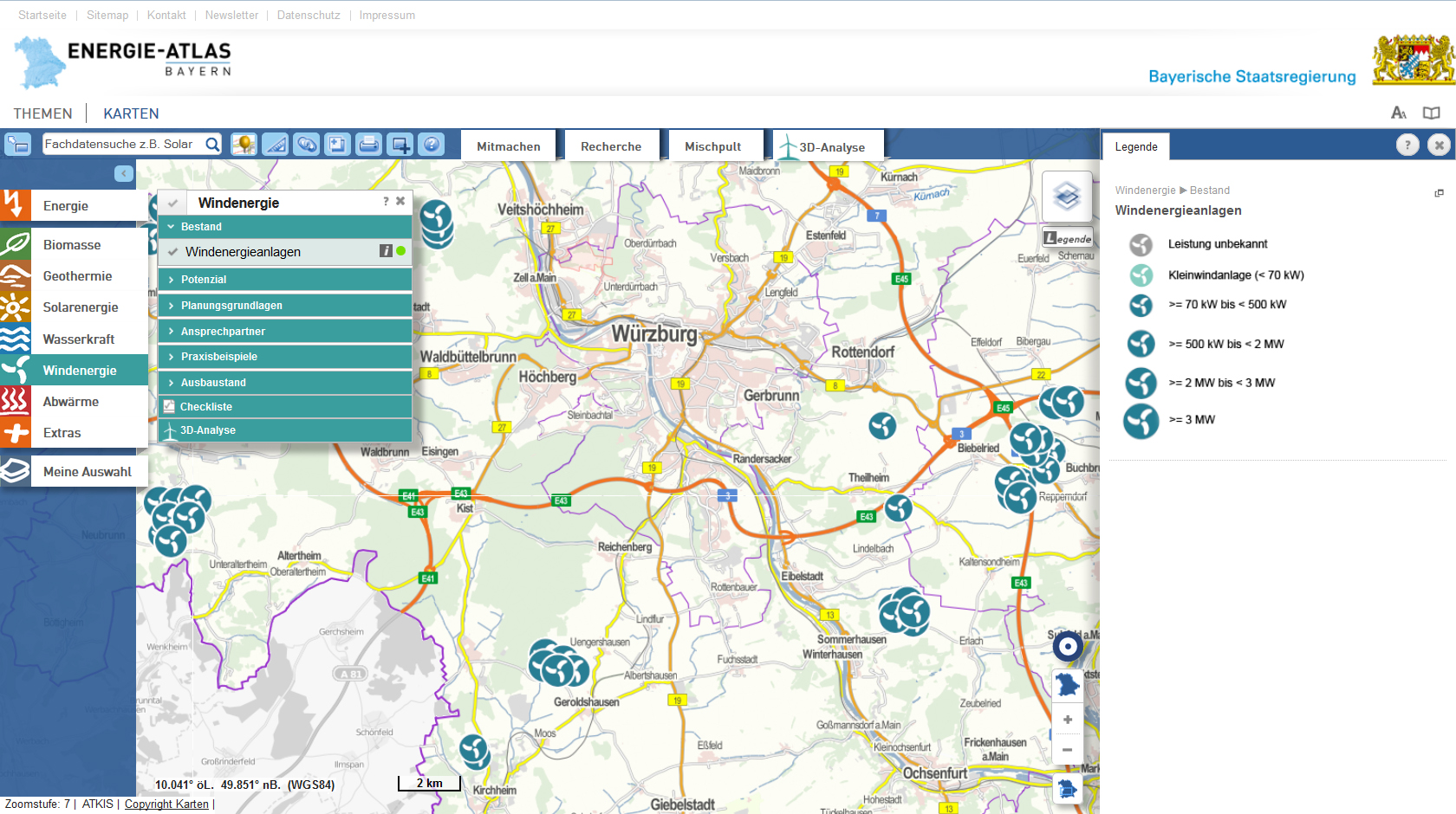 Kartenausschnitt Würzburg des Energie-Atlas Bayern ( mit aktivierter Datenebene Windenergieanlagen